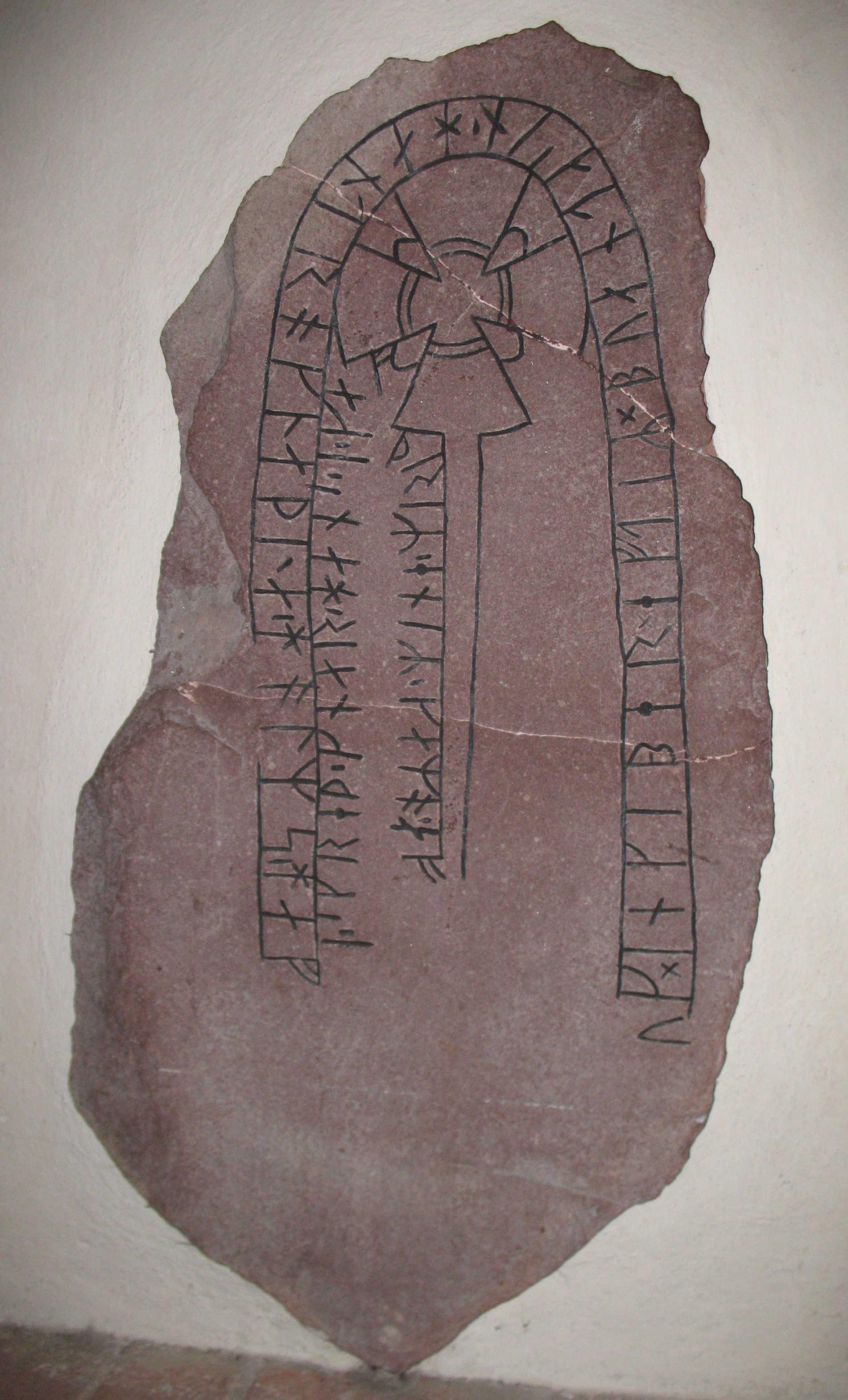 Runestone U 214 in Vallentuna kyrka.